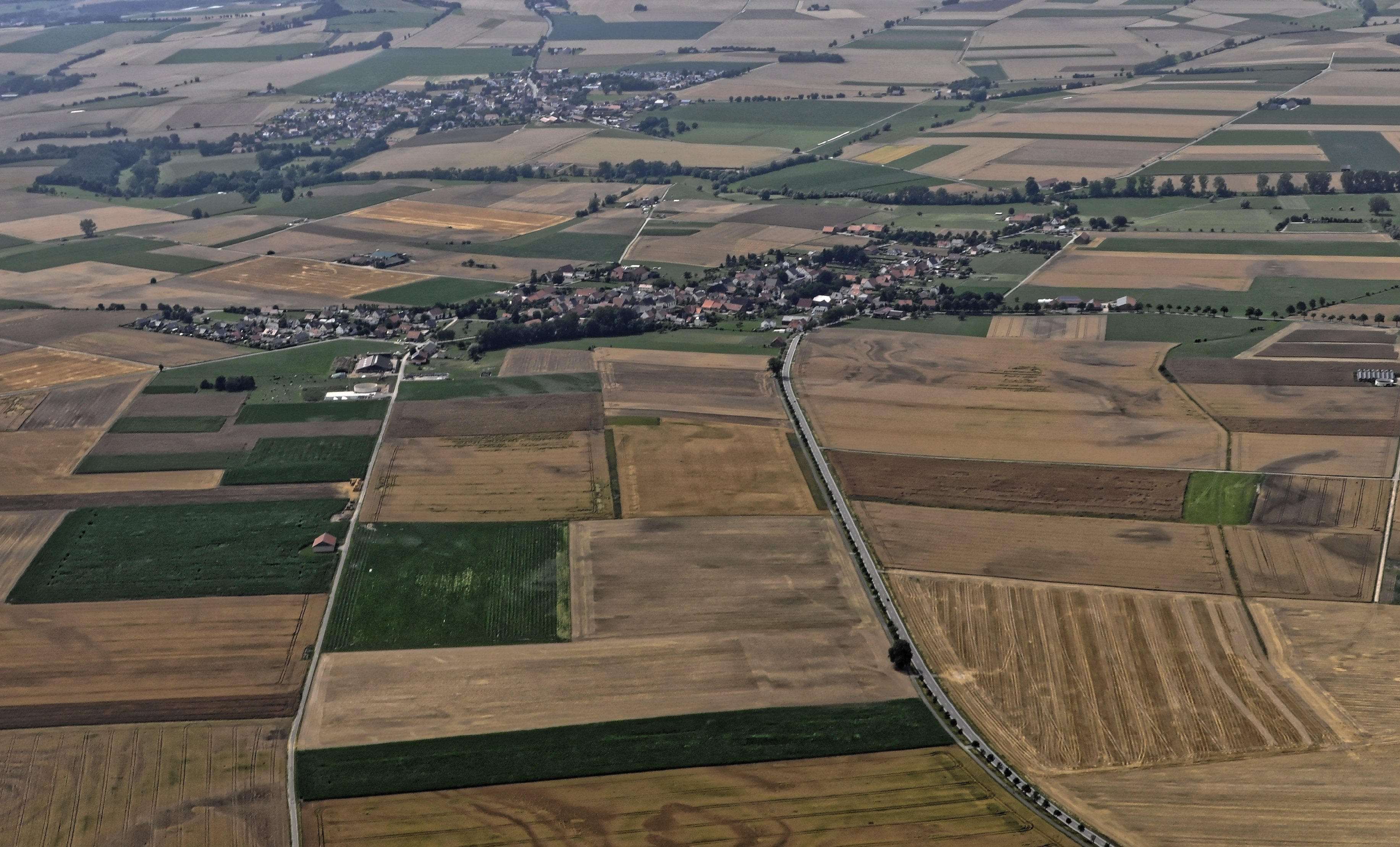 Bilder vom Flug Nordholz-Hammelburg 2015: Rösebeck; links hinten Daseburg